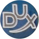 Firmenlogo Dux Automobil Werke